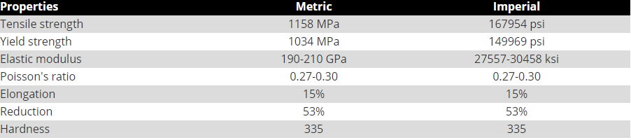 مکانیکی 3434